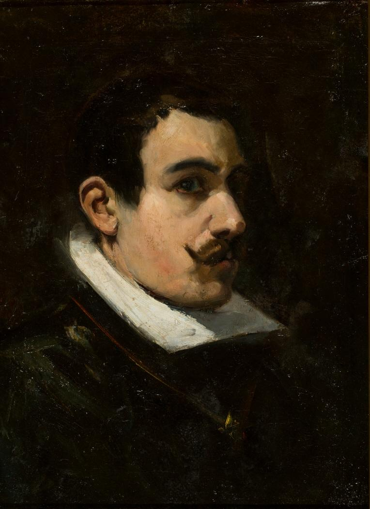 Autorretrato del pintor español Mariano Barbasán a los 23 años, oriundo de Zaragoza.